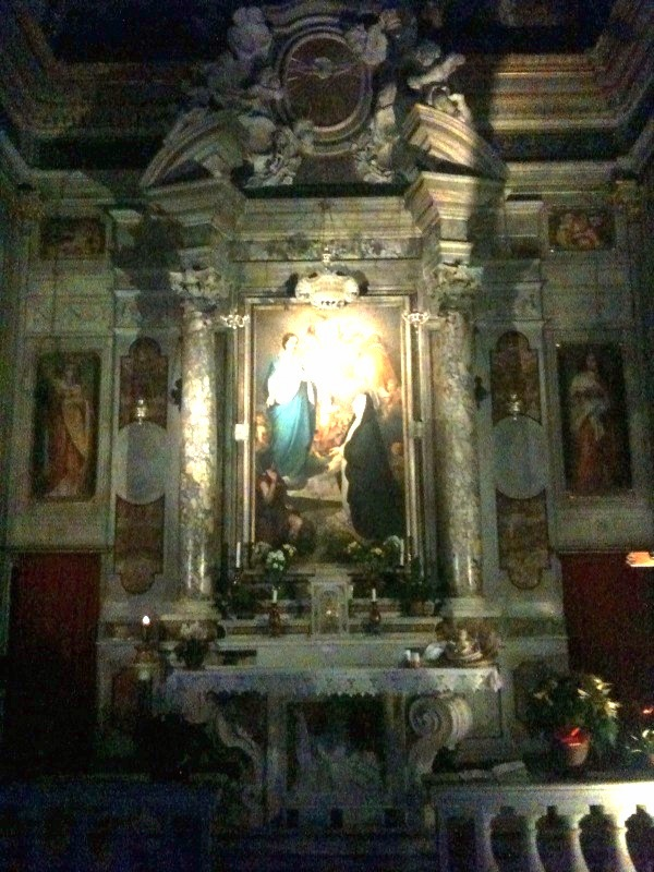 Chiesa di Santa Caterina (interno) a Varazze SV (Italy)